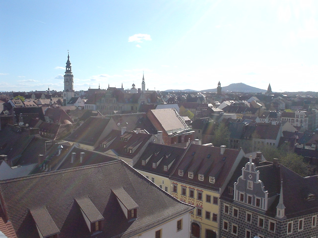 Görlitz, Blick vom Turm von St.Peter und Paul uber die Stadt